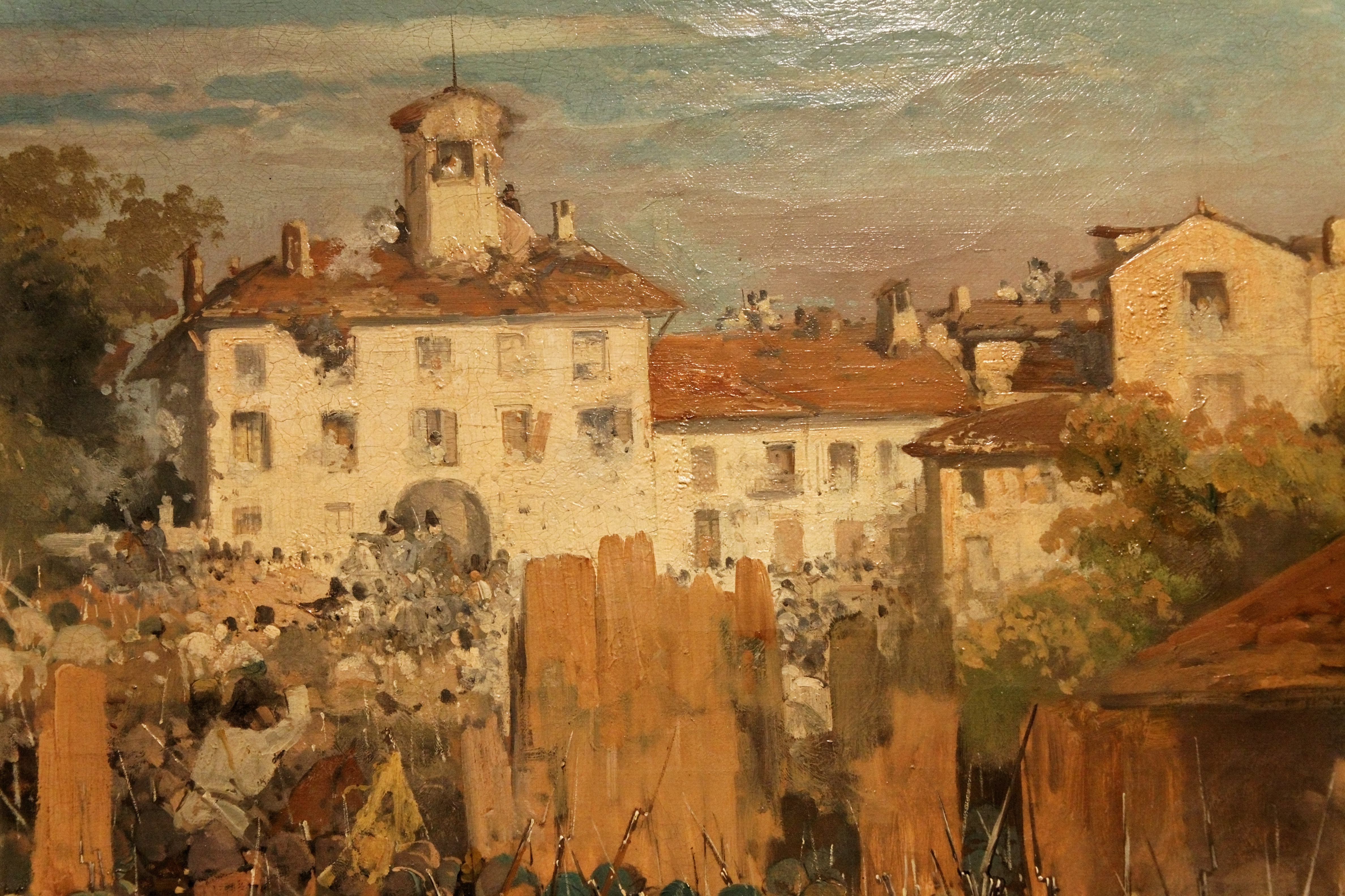 LA bataille de Magenta par Gerolamo Induno.